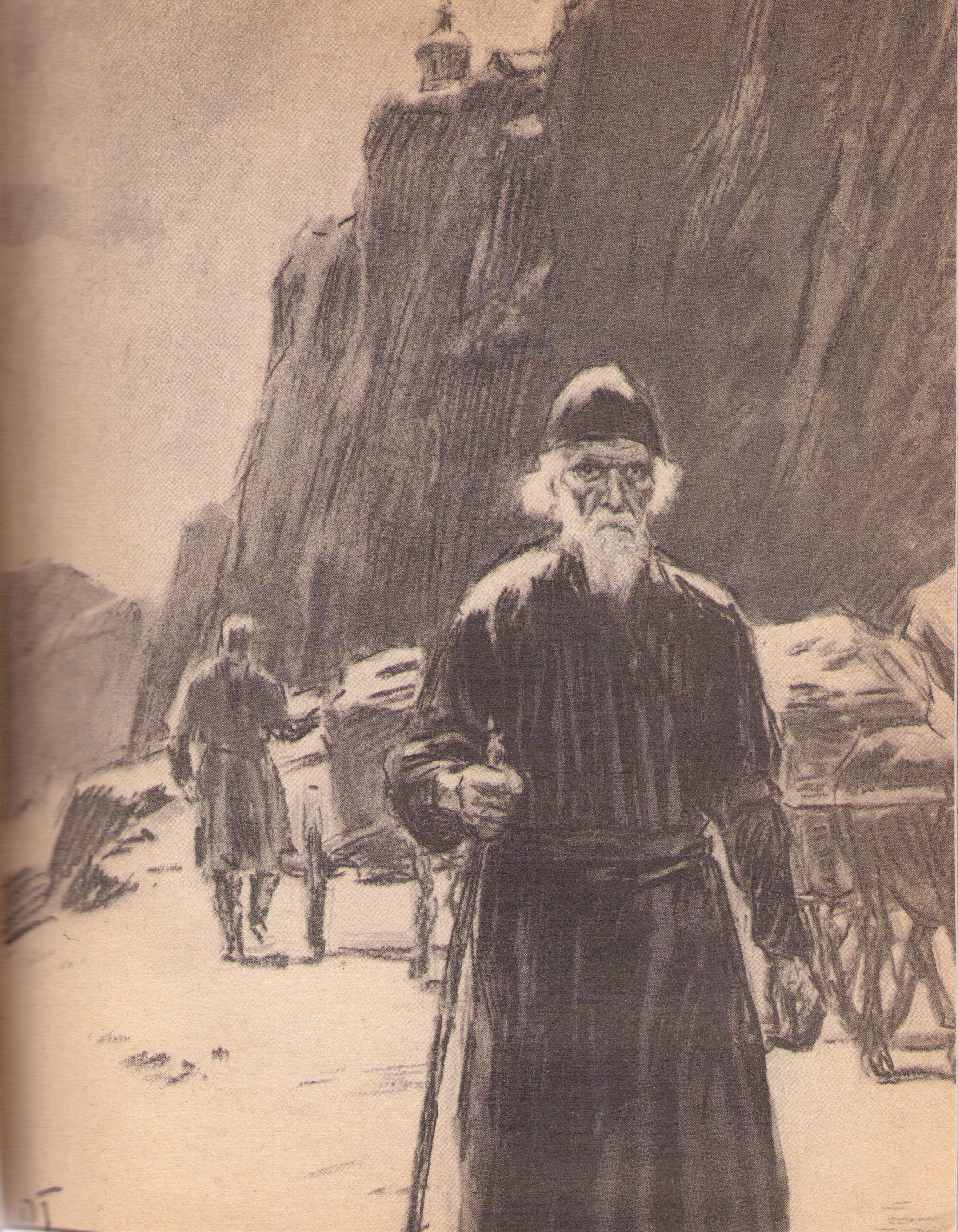 Гроссе О.И. "Путешествие за рукописями на Восток было последним подвигом старца Арсения". - Иллюстрация из книги По следам находок и утрат / составитель Р.Т. Пересветов ; художник О.И. Гроссе. – 2-е изд., испр. и доп. - М. : Советская Россия, 1963. – 287 с. : ил.